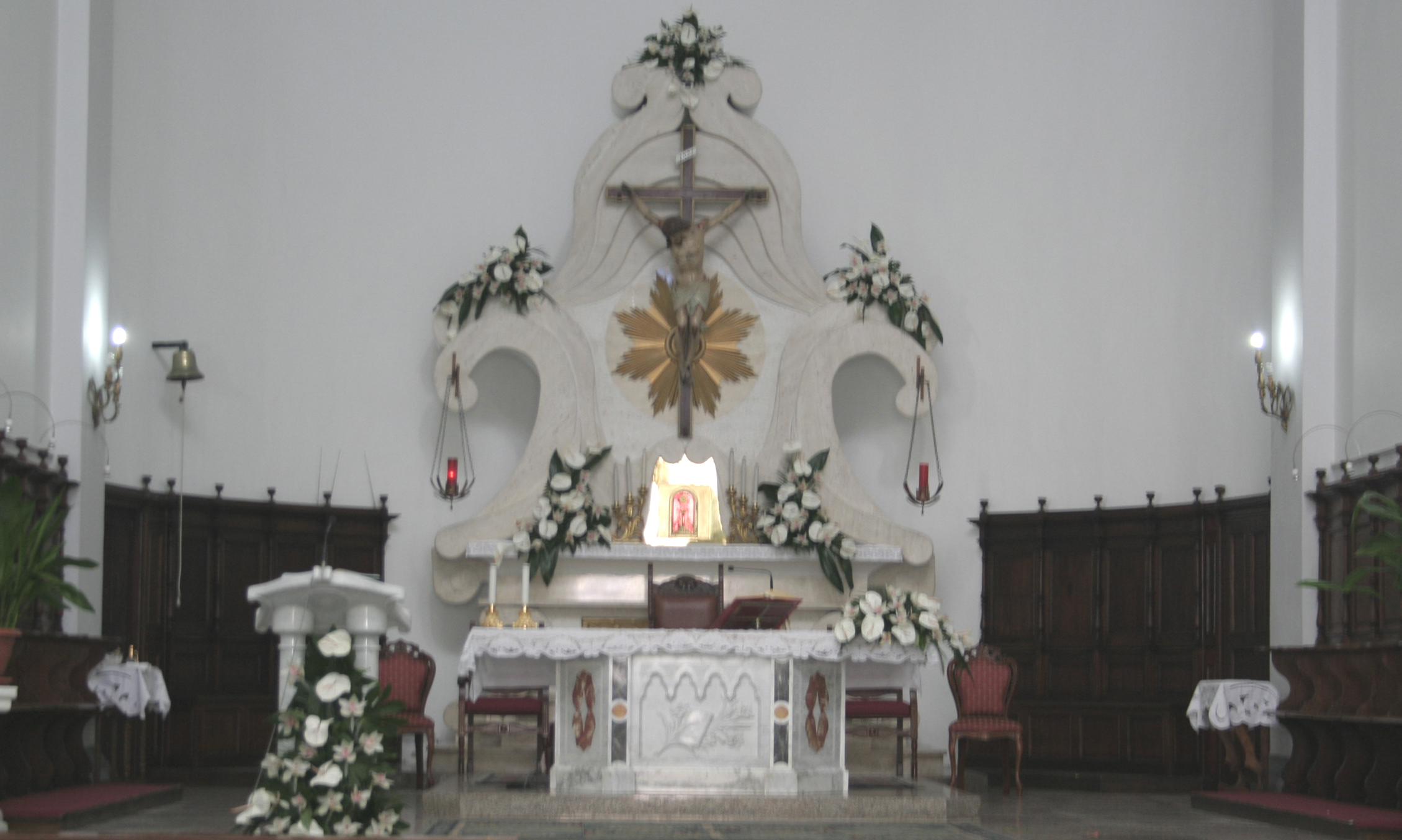 Altare maggiore della chiesa di Sant'Antonio da Padova, Quartu Sant'Elena (Cagliari)